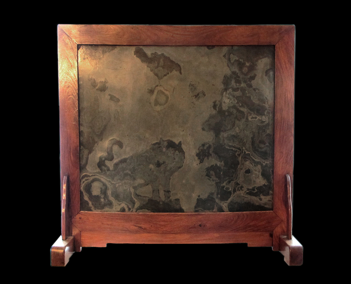 Ecran de table anping de lettré chinois. Bois de huanghuali et pierre verte lüshi. Chine fin 16e - début 17e. H. 90, L. 45, P. 34 cm. Musée des arts asiastiques - Guimet. Paris. Don Philippe De Backer, 2004. Ref. : De l’Inde au Japon, 10 ans d’acquisitions au musée Guimet, 2007. ISBN 978-2-7118-5369-4. Pages 128-129